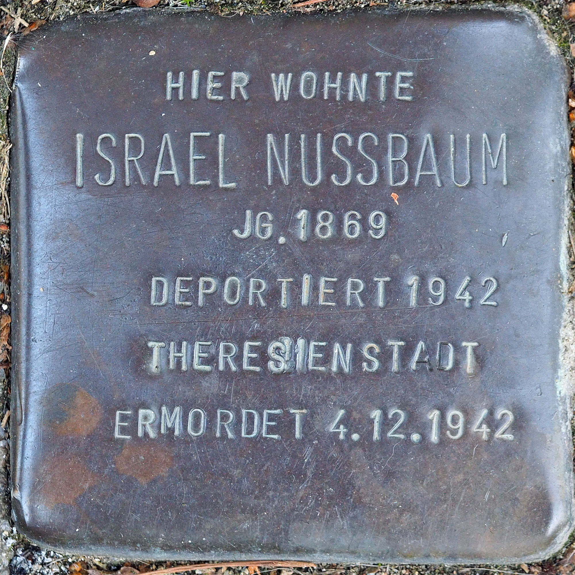 Stolperstein VIE: Nussbaum, Israel